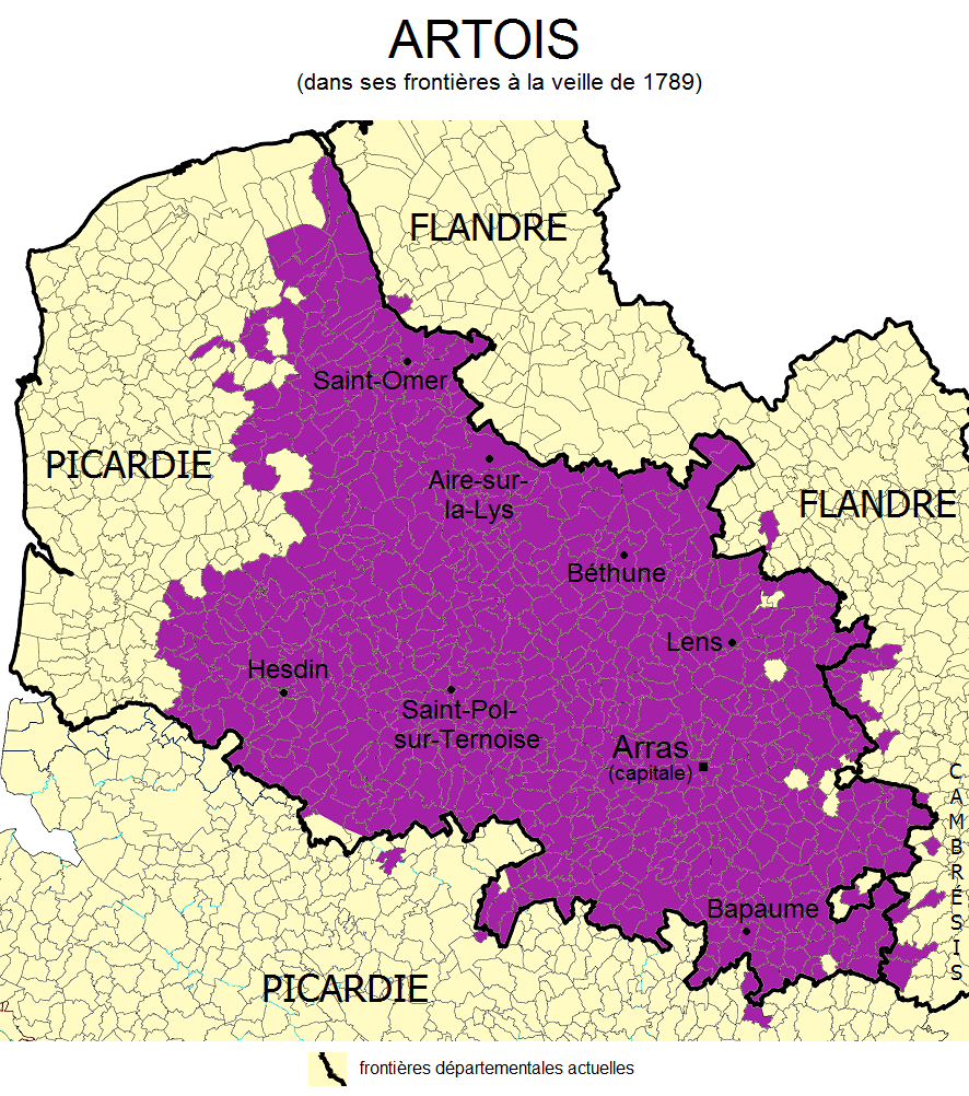 Carte de l'Artois dans ses frontières à la veille de 1789, basée sur l'État par ordre alphabétique des Villes, Bourgs, Villages & hameaux de la Généralité de Flandres & d'Artois publié en 1787.